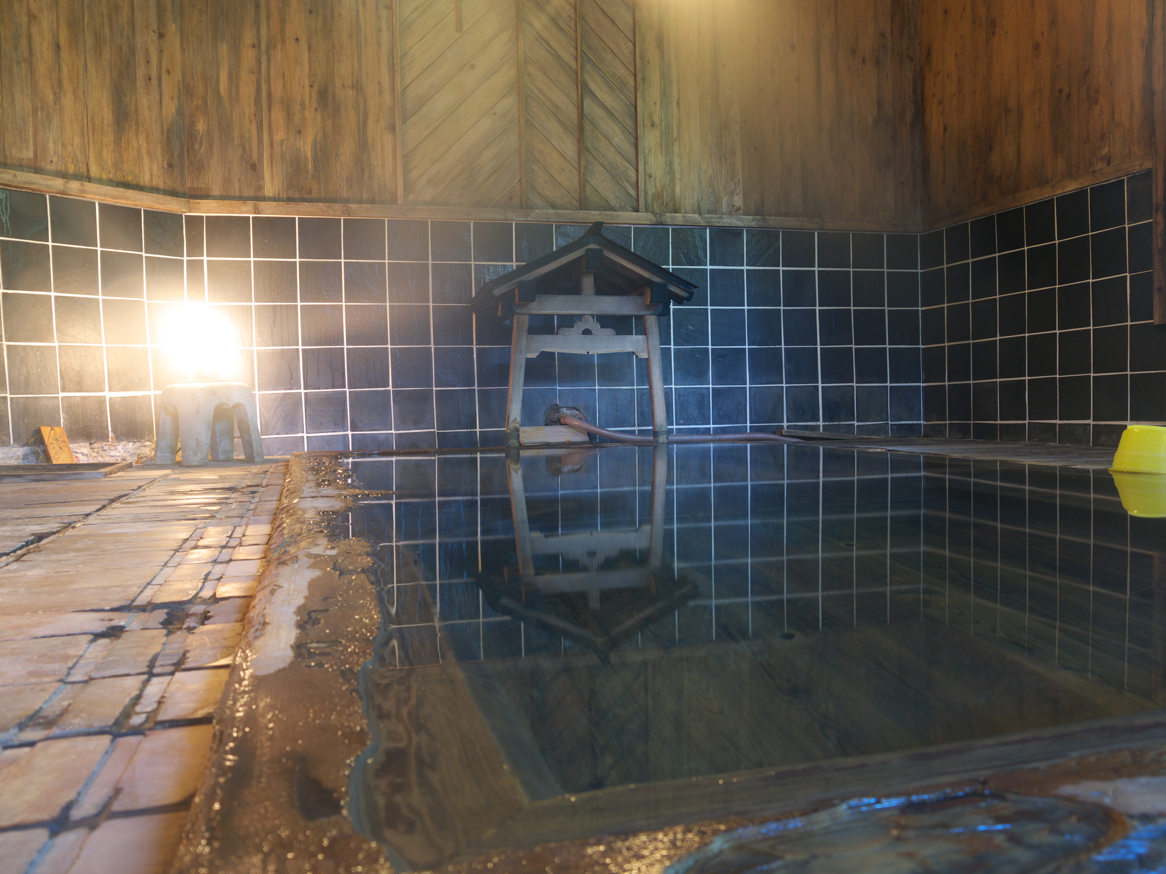 横向温泉下の湯浴槽